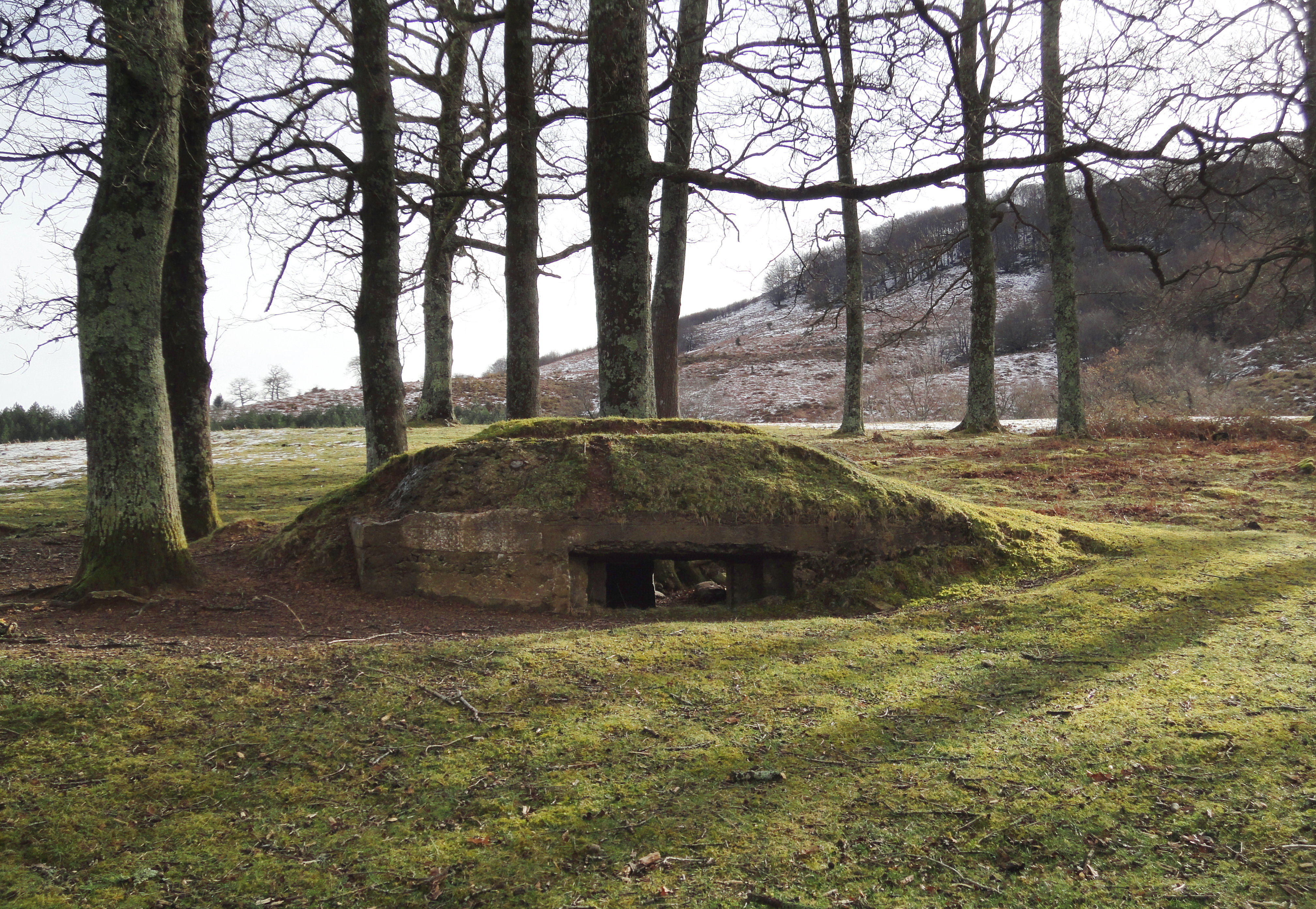 Orainbetasaroiko bunkerra - Etxalar